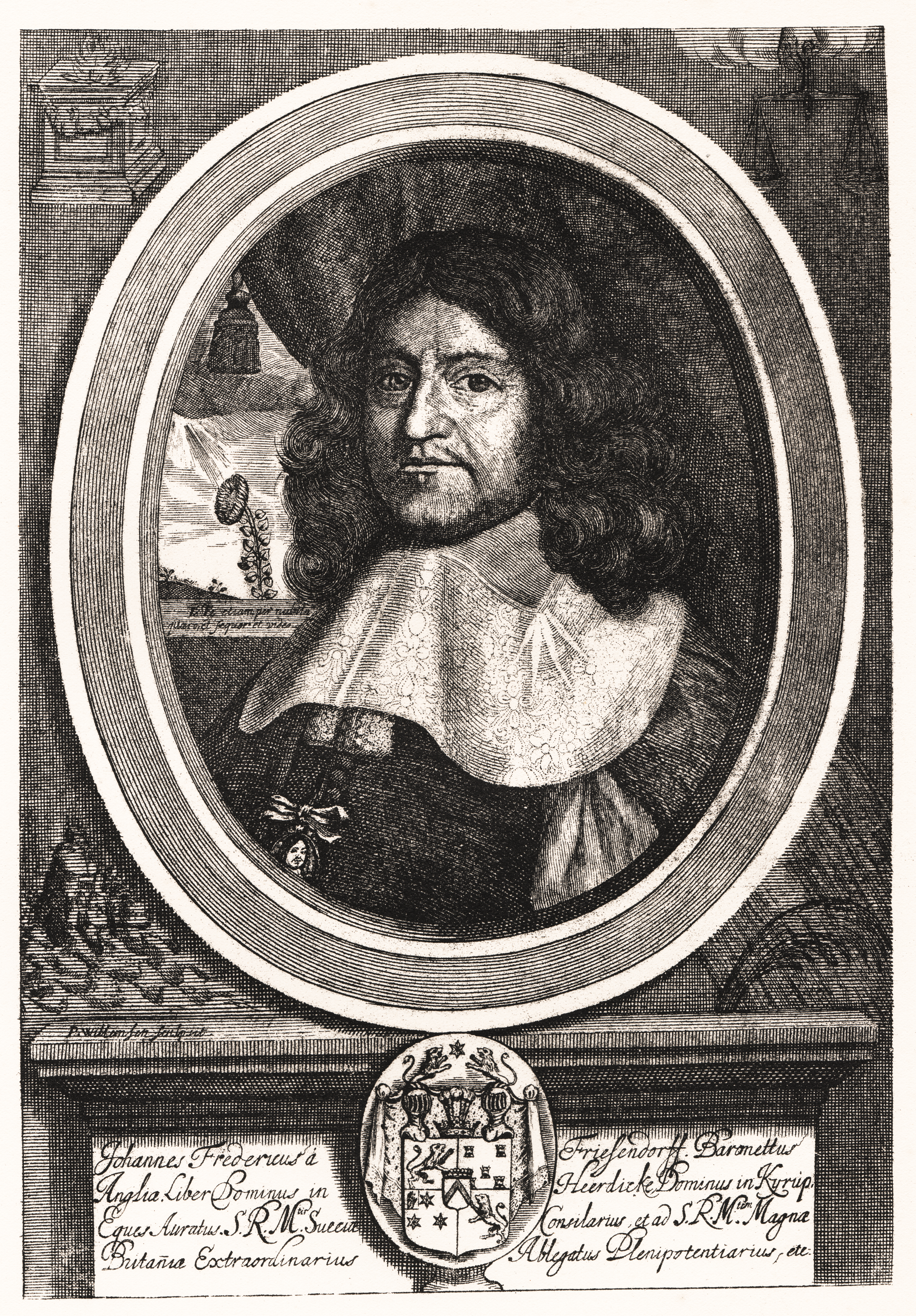 Johan Fredrik von Friesendorff (1617-1669).